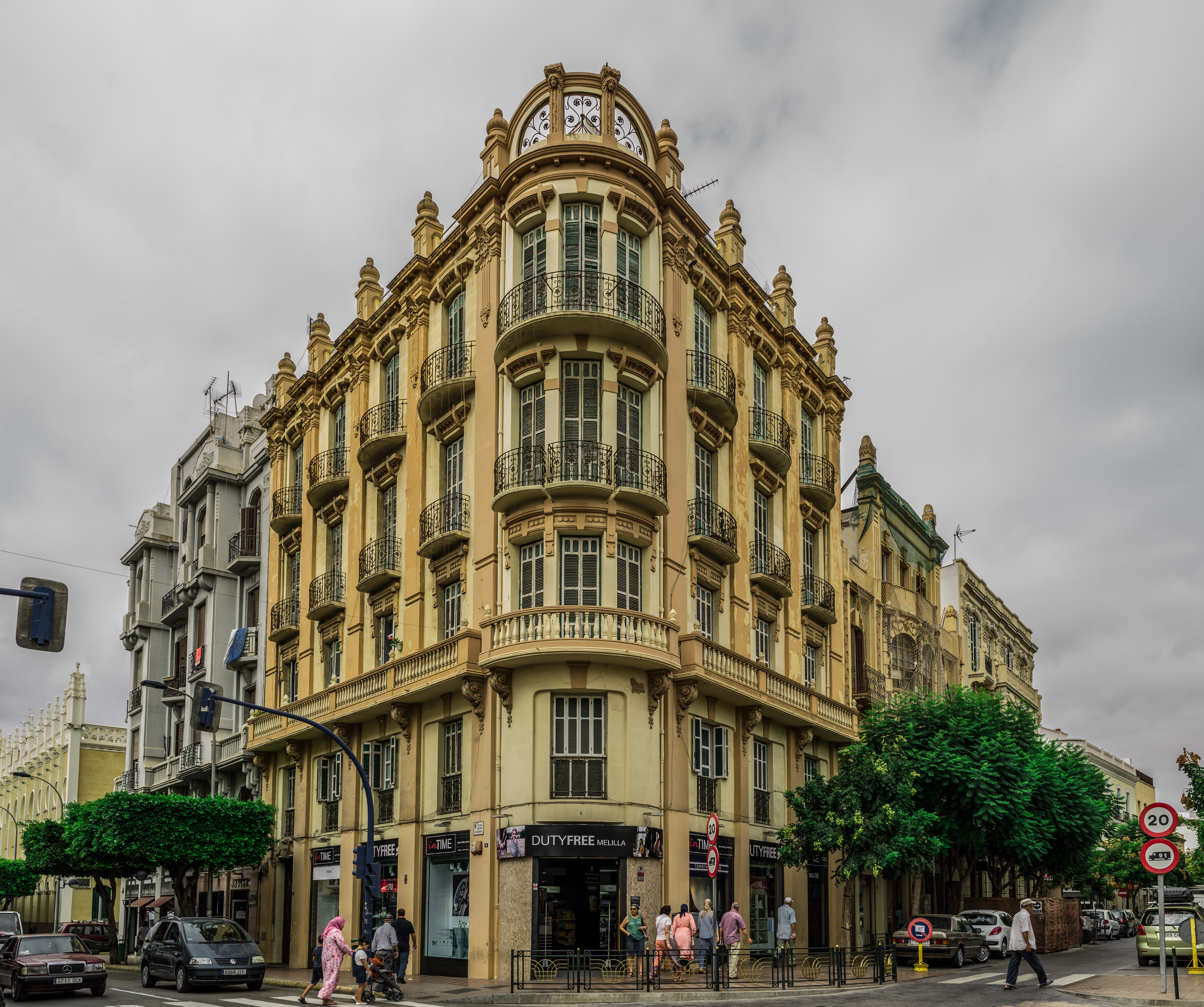 Edificio "El Acueducto". Enrique Nieto (1928-1929)